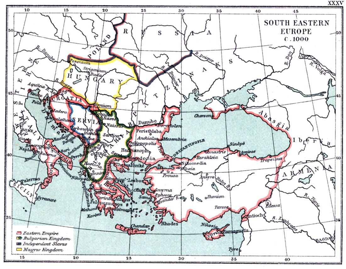 XXXV SE Europe c. 1000